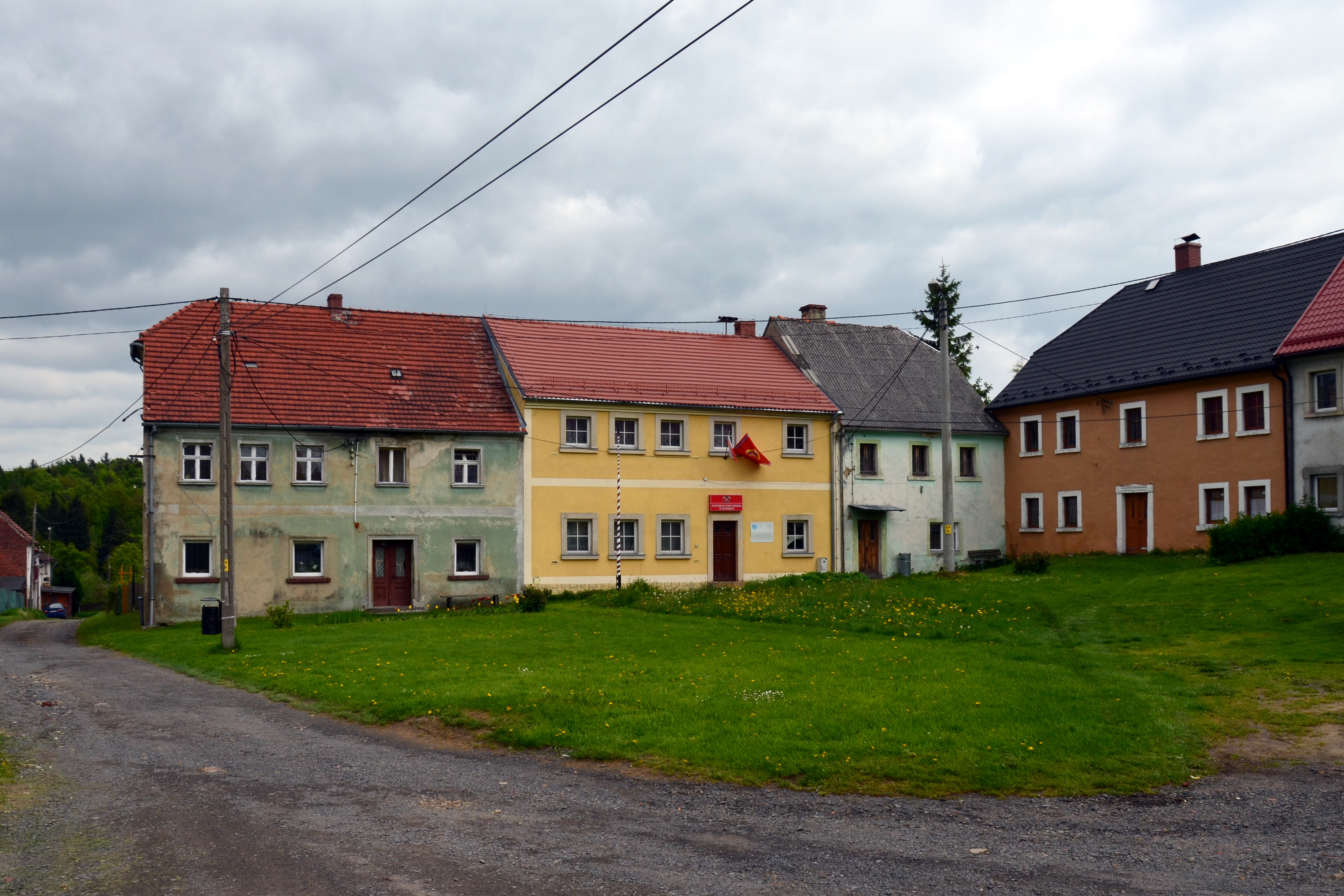 Złotniki Lubańskie - Rynek w obrębie starego miasta, 1672